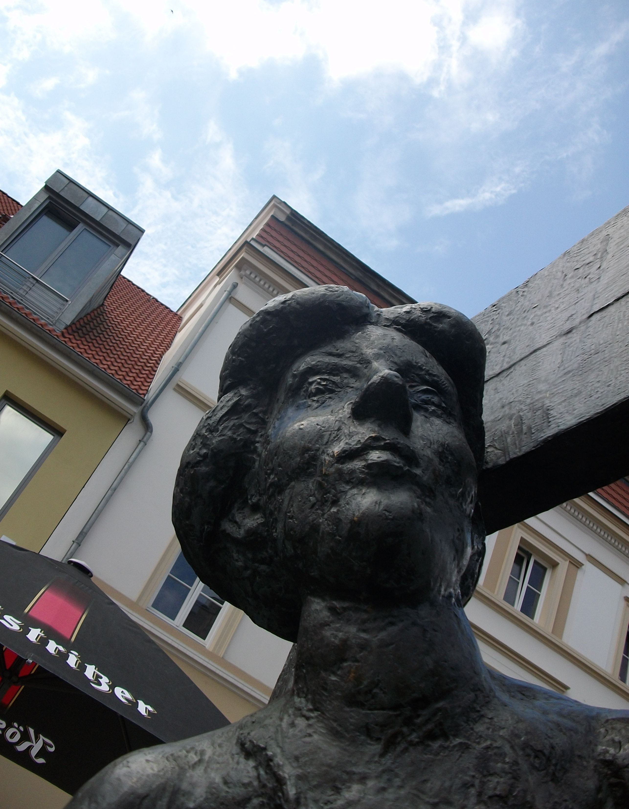 Frau am Fischerbrunnen, Greifswald